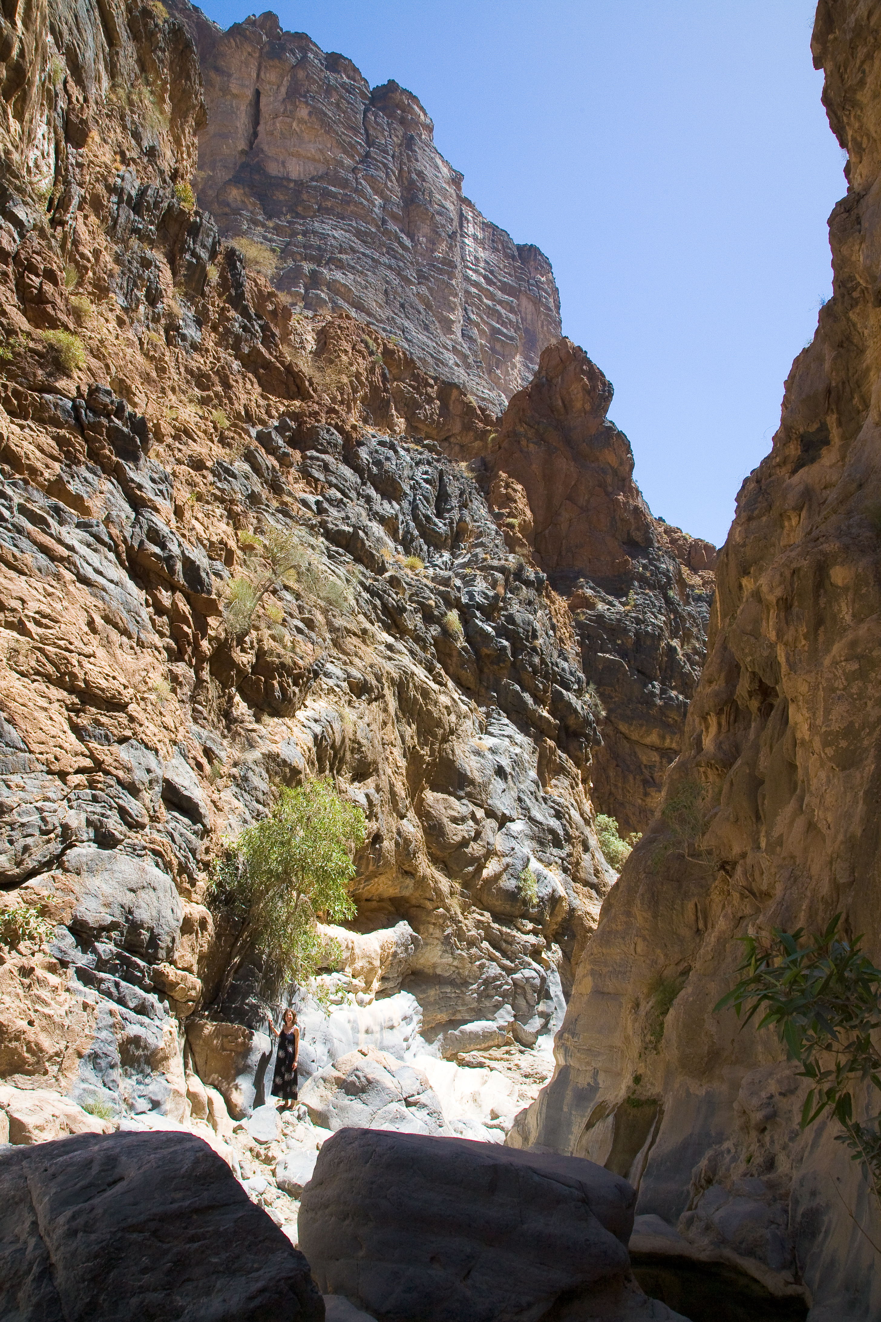 Snake Gorge, Oman